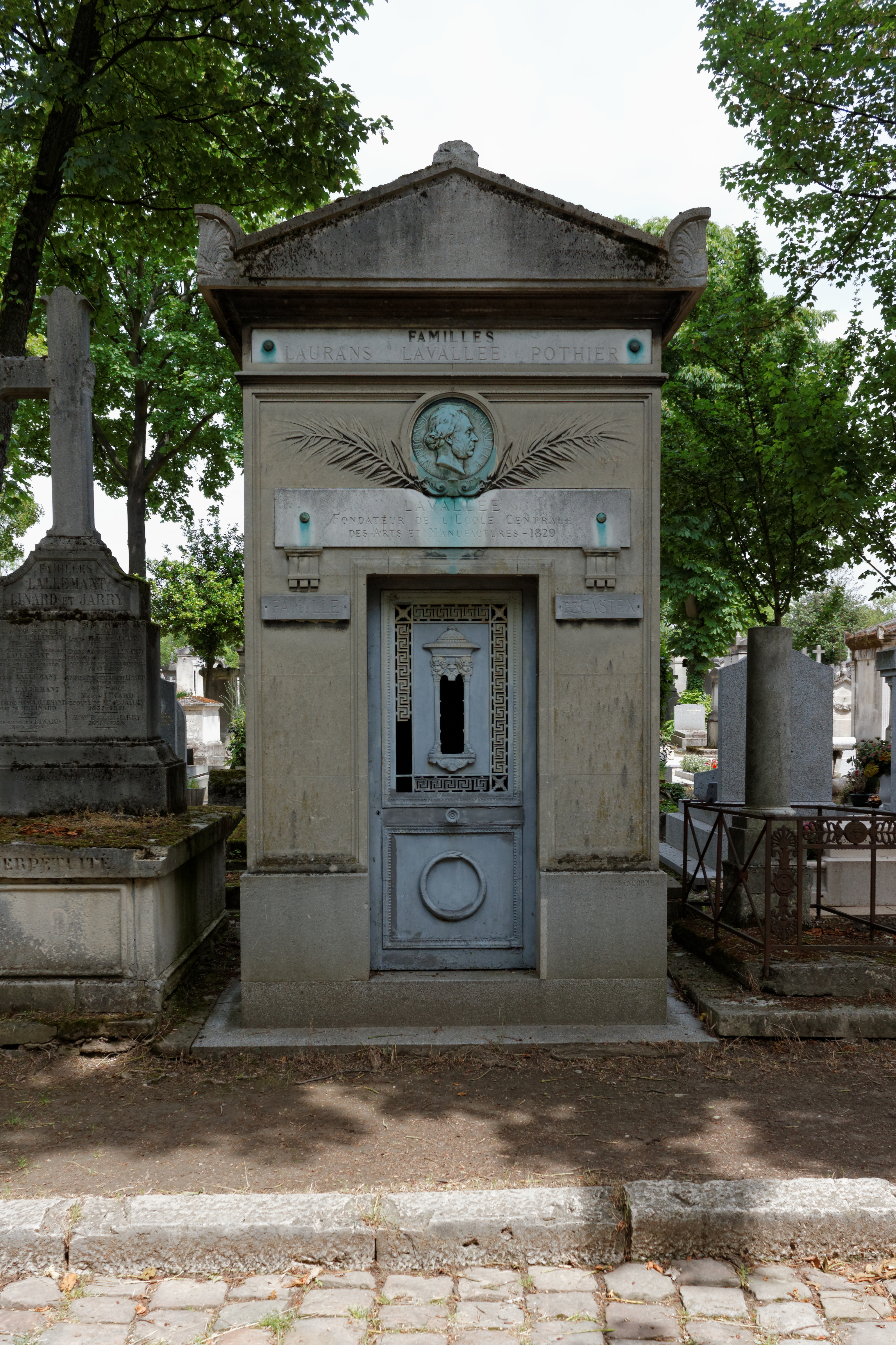 Chapelle